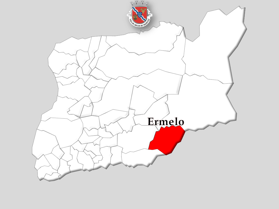 Censos 1864/2011